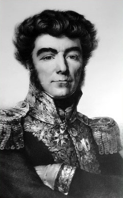 Jean-Pierre Maransin (1770-1828), général de division et baron de l'Empire.